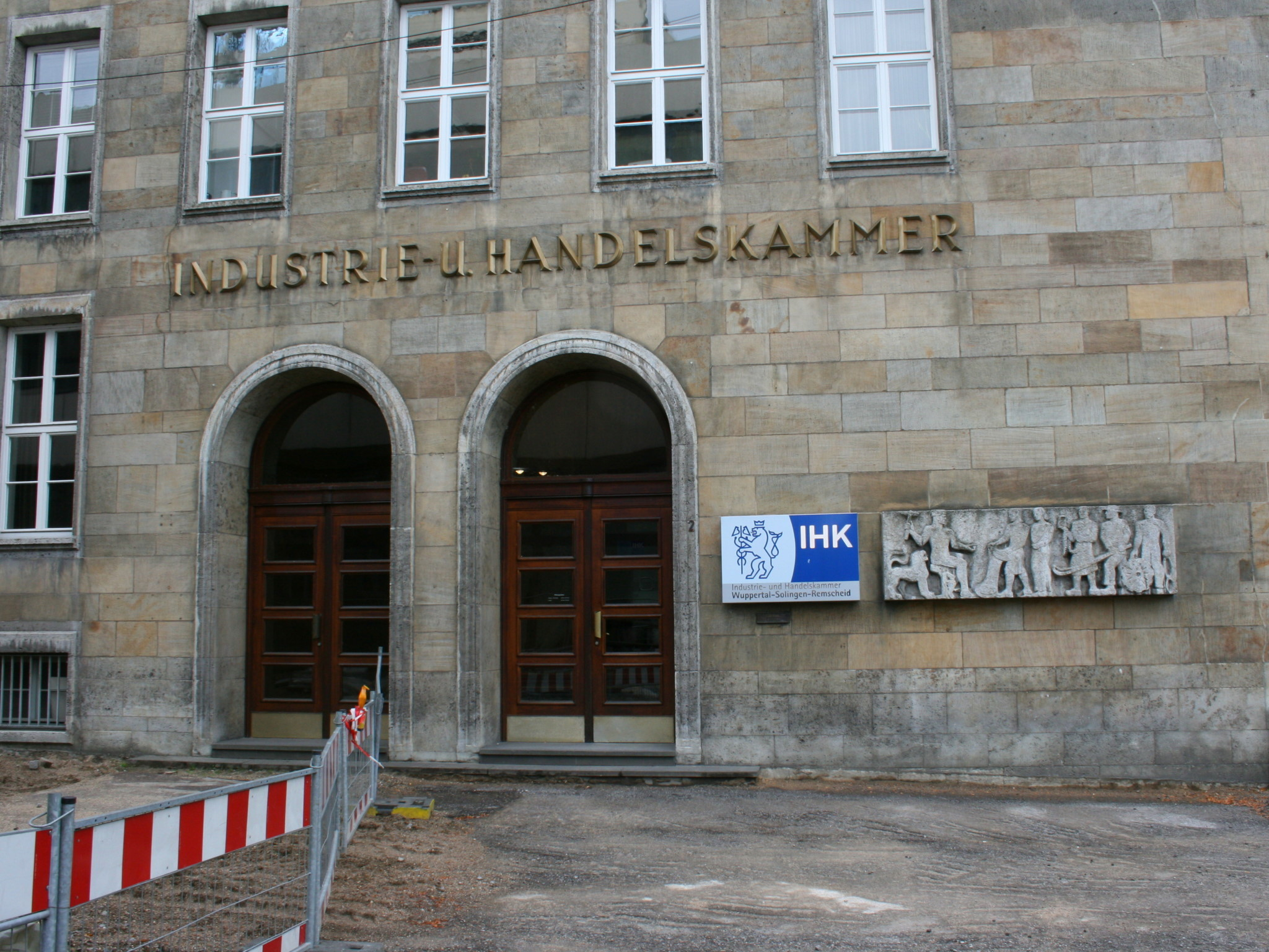 Städtisches Verwaltungsgebäude Alexanderbrücke in Wuppertal